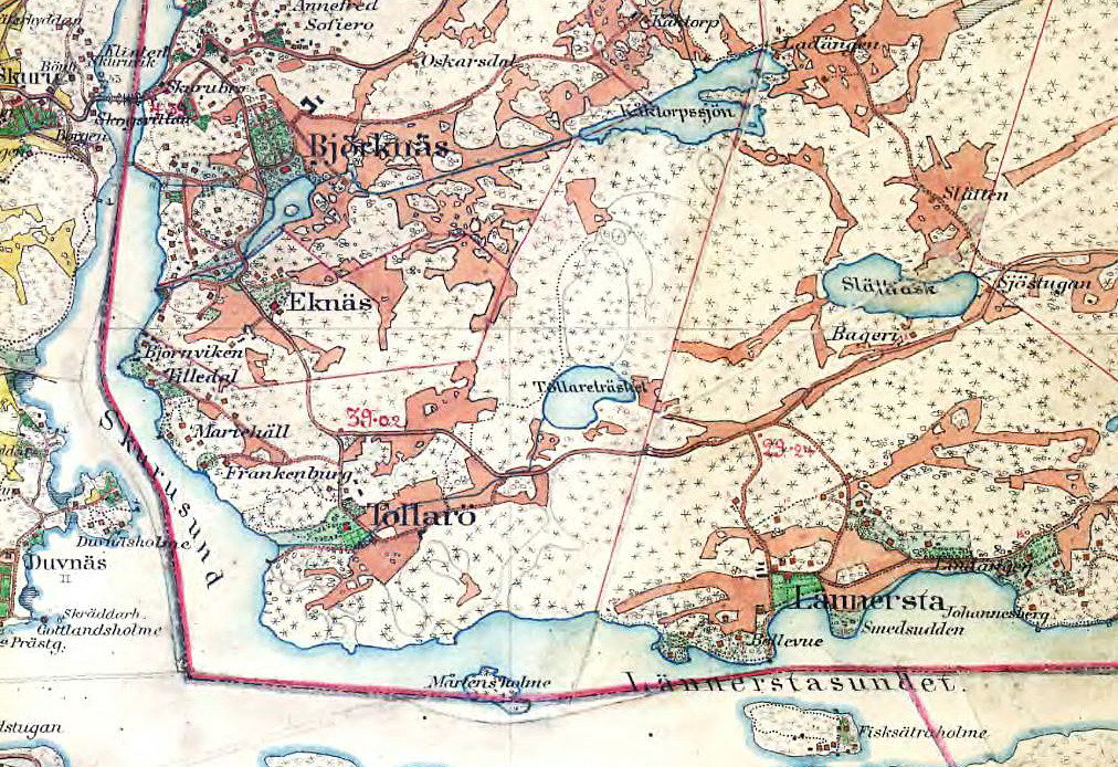 Del av Häradsekonomiska kartan med Björknäs, Tollare, Lännersta